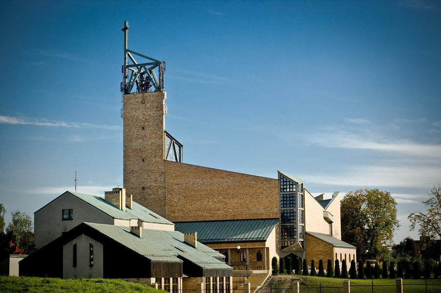 Kościół Św.Anny w Gliwicach w dzielnicy Łabędy fot. Dominik Mryka